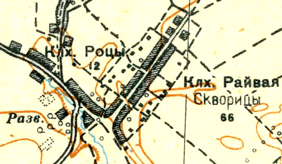 Топографическая карта Ленинградской области, квадрат О-35-24-Б-б (Колхоз Туганицы), деревня Скворицы